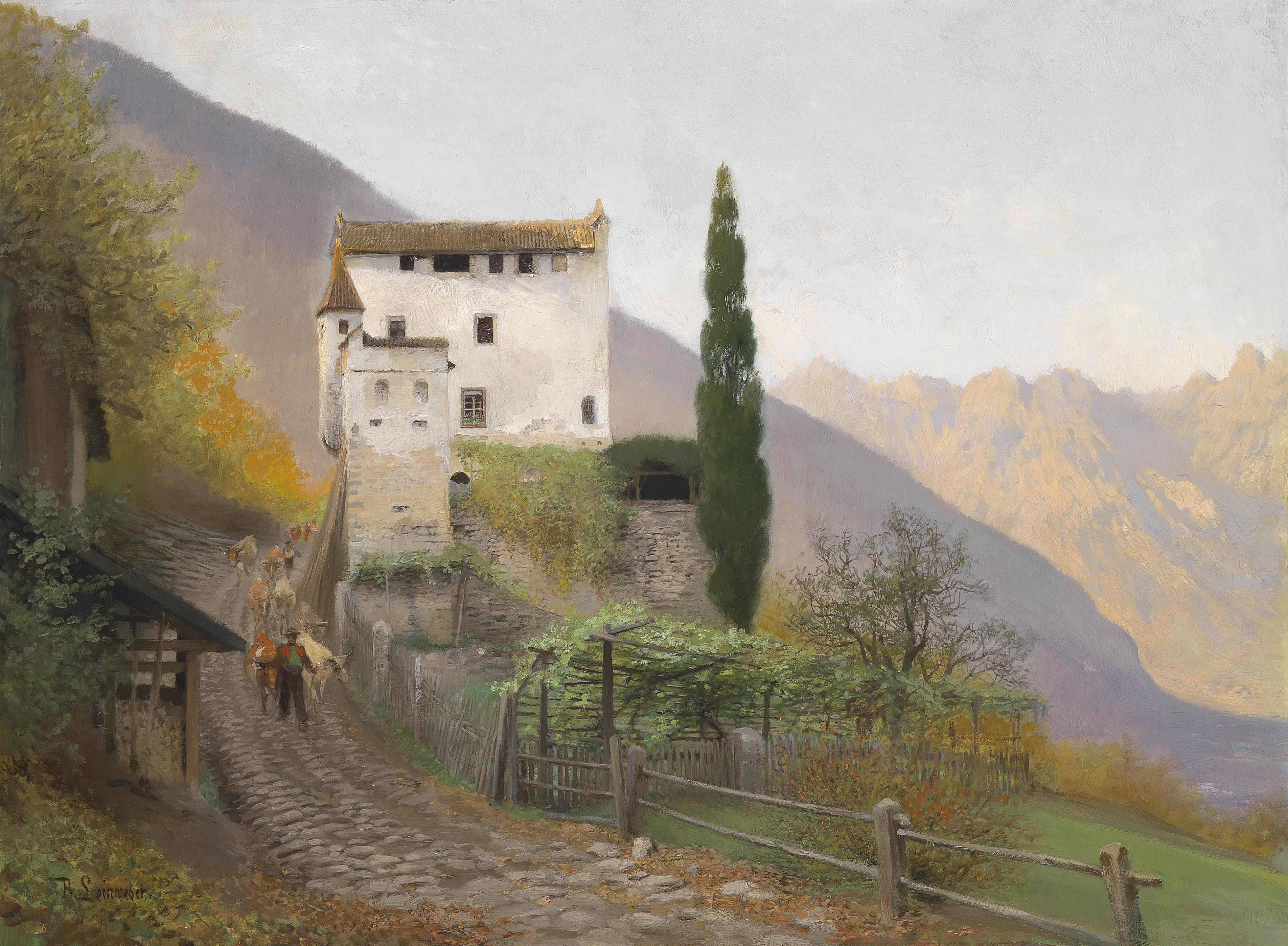 Helmsdorf Südtirol an einem Frühlingstag, signiert AR. Leinweber, Öl auf Holz, 59 x 80 cm